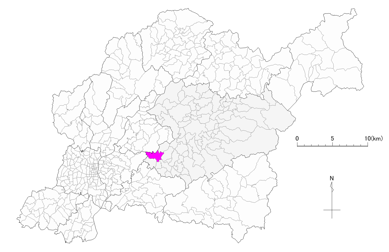 豊田市則定町位置図